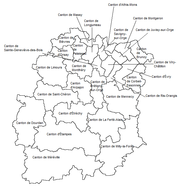 Carte des cantons de l'Essonne (91) en 1967.